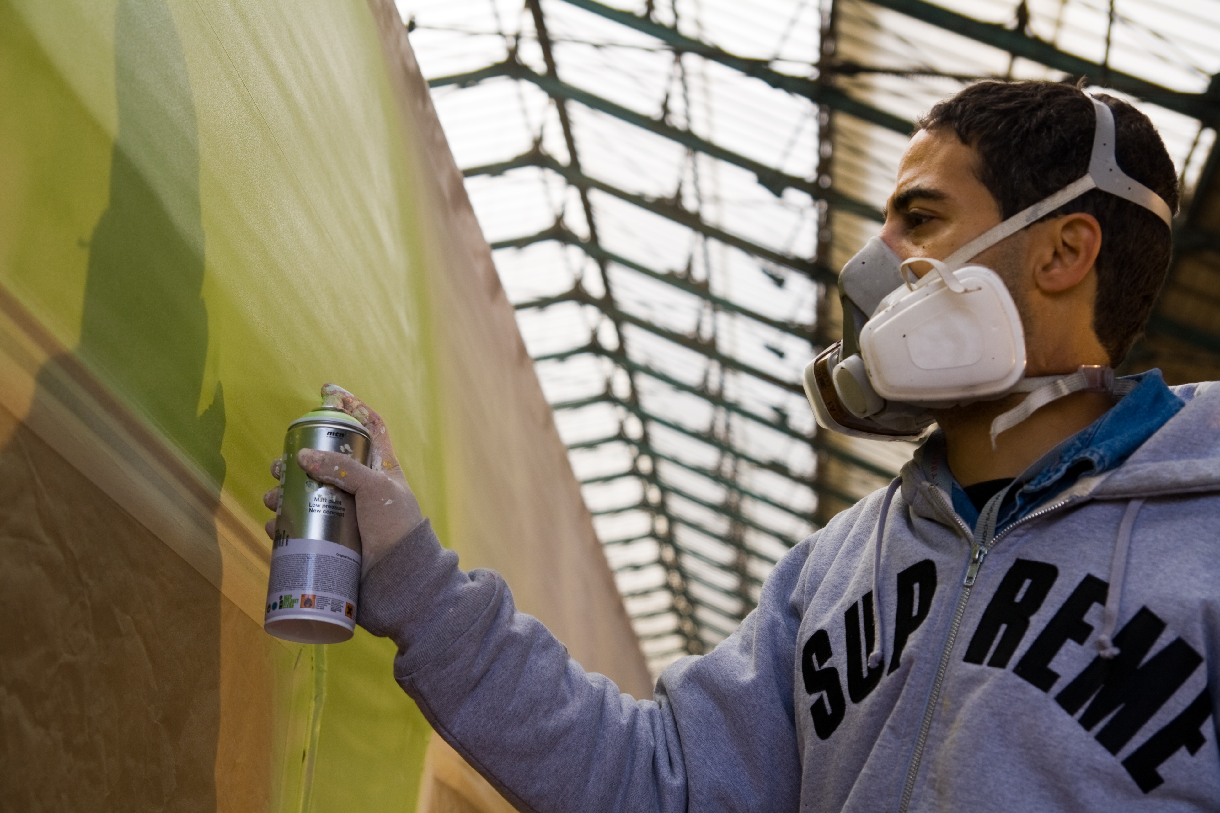 Jonone peignant un Thalys pour le lancement de la ligne reliant Amsterdam et Cologne